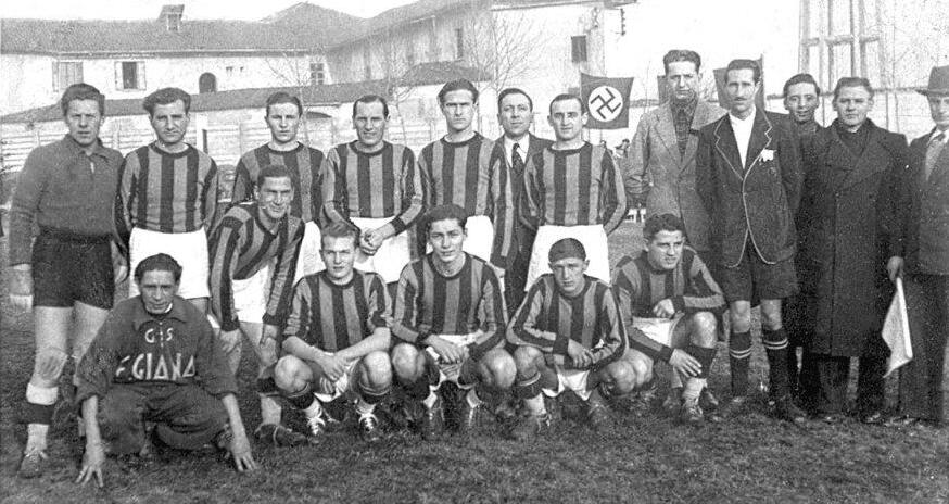 Formazione del G.S. Erminio Giana - poi A.S. Giana Erminio -, squadra calcistica di Gorgonzola (MI) nel 1939